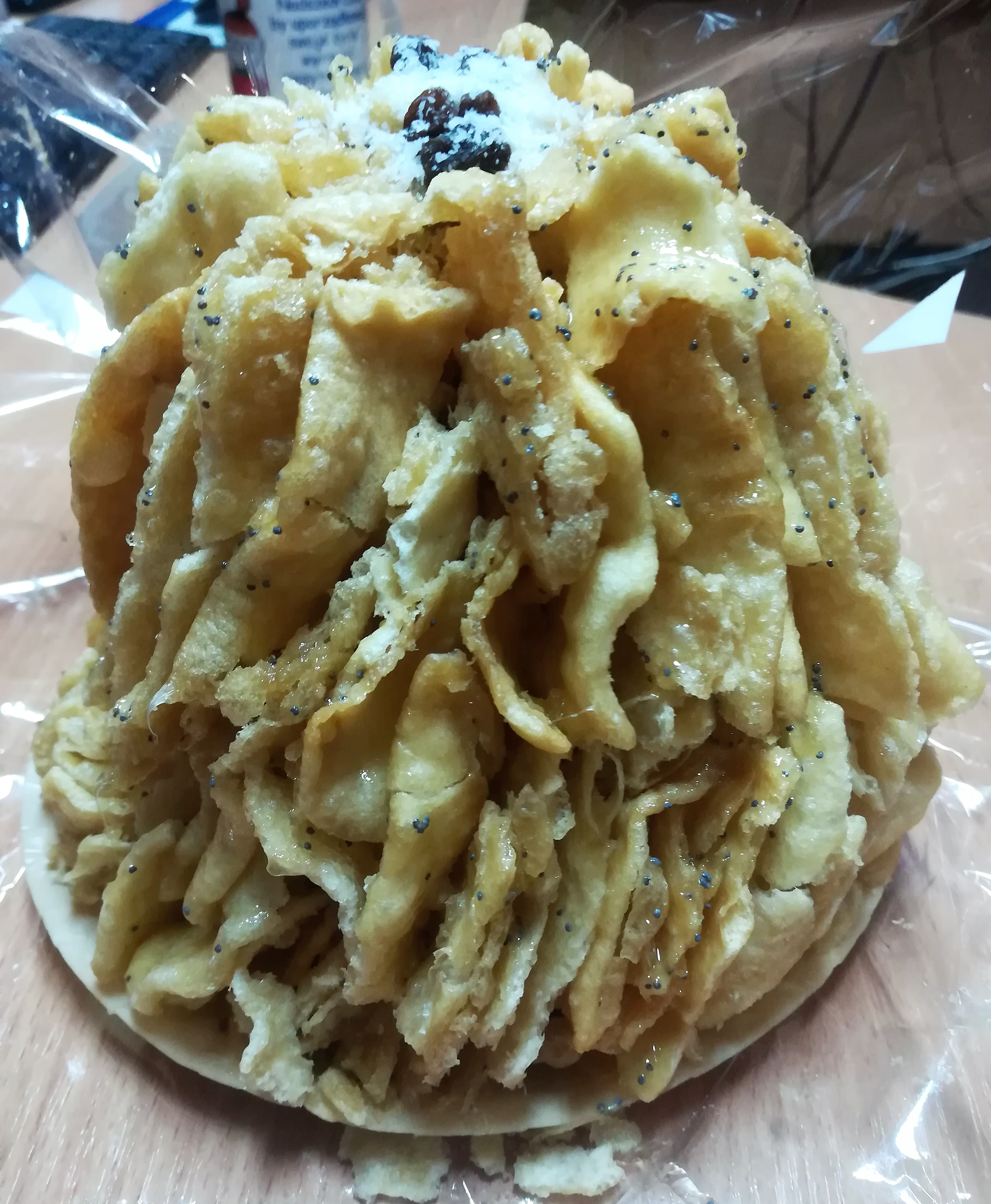 Polskie ciasto zwane mrowiskiem.